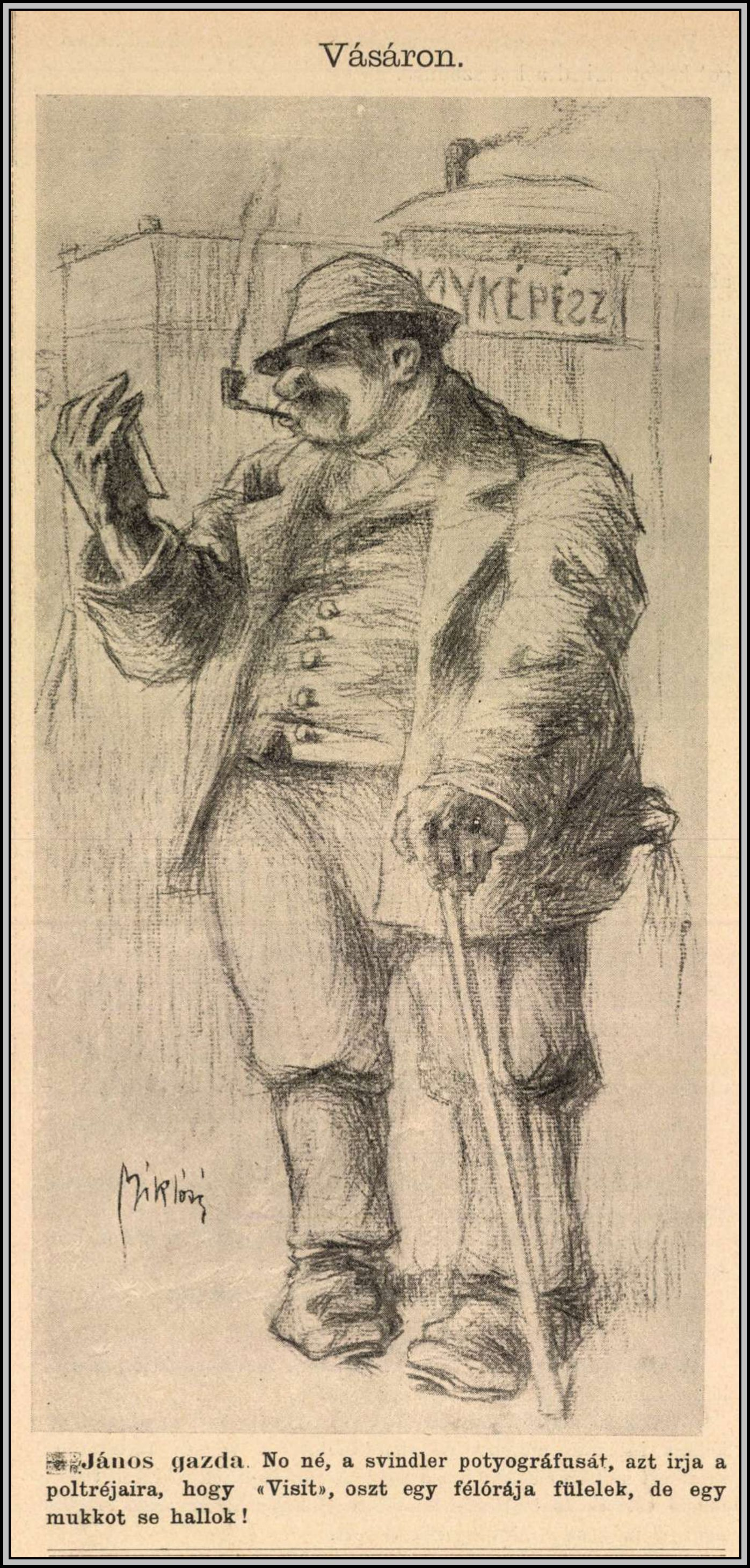 Miklósi-Mutschenbacher Ödön (Szekszárd, 1881. szeptember 10.[4] – Szekszárd, 1942. április 18.) festőművész, illusztrátor, karikaturista rajza a Bolond Istók c. lapban, 1905